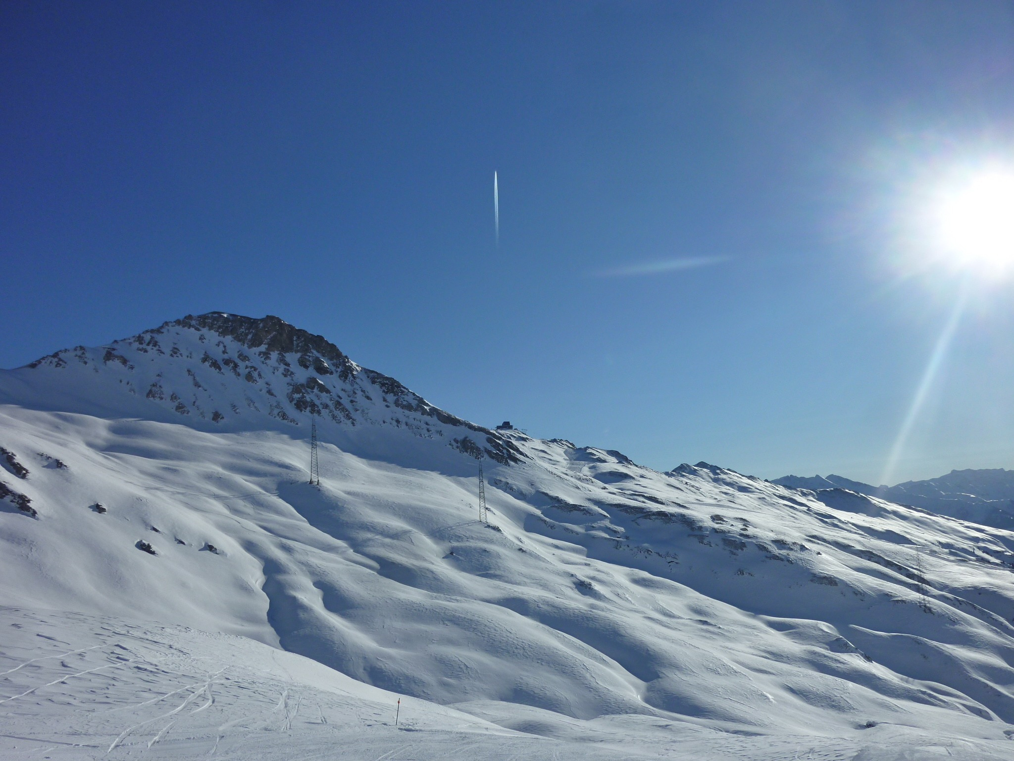 Crap Masegn, rechts die gleichnamige Bergstation, davor Maste der Vorableitung